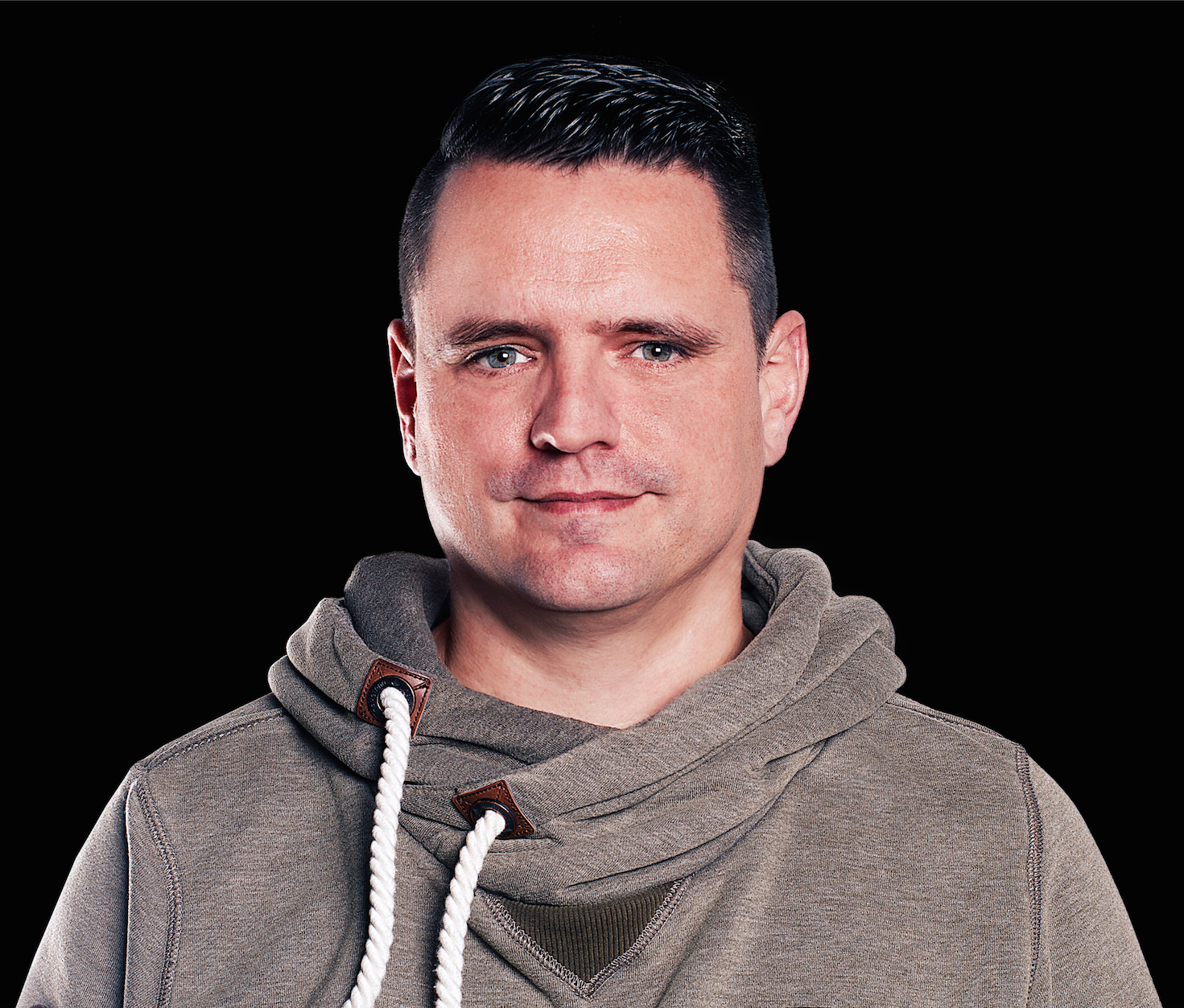 DJ Zany